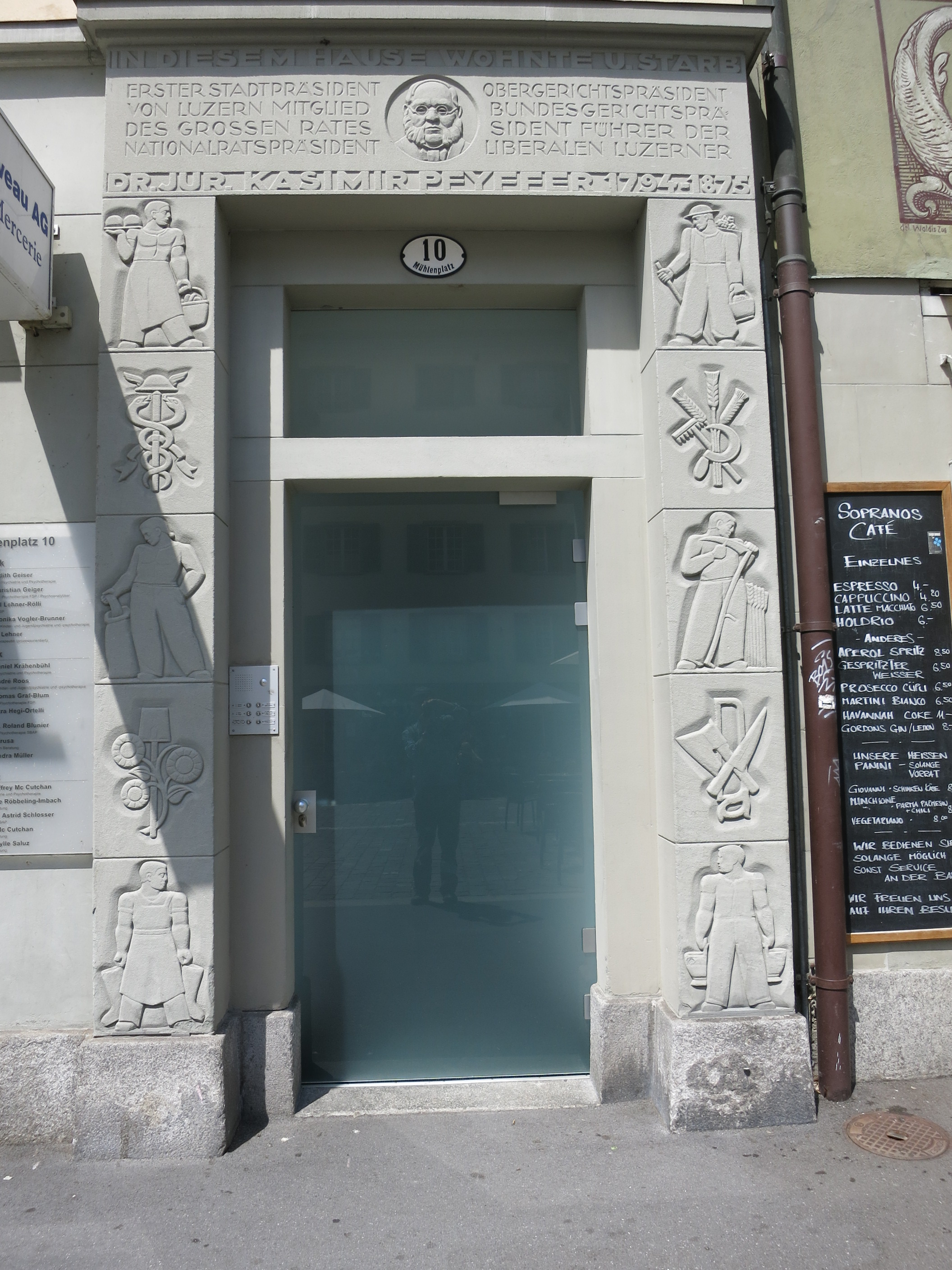 Wohnhaus, Mühlenplatz 10, Luzern LU, Schweiz